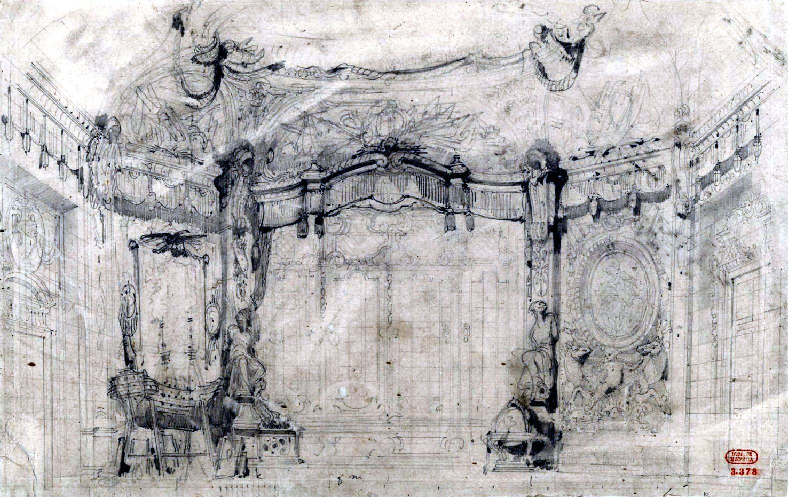 Esquisse du décor de l'Acte III de L'Etoile du Nord de Meyerbeer par Charles Cambon